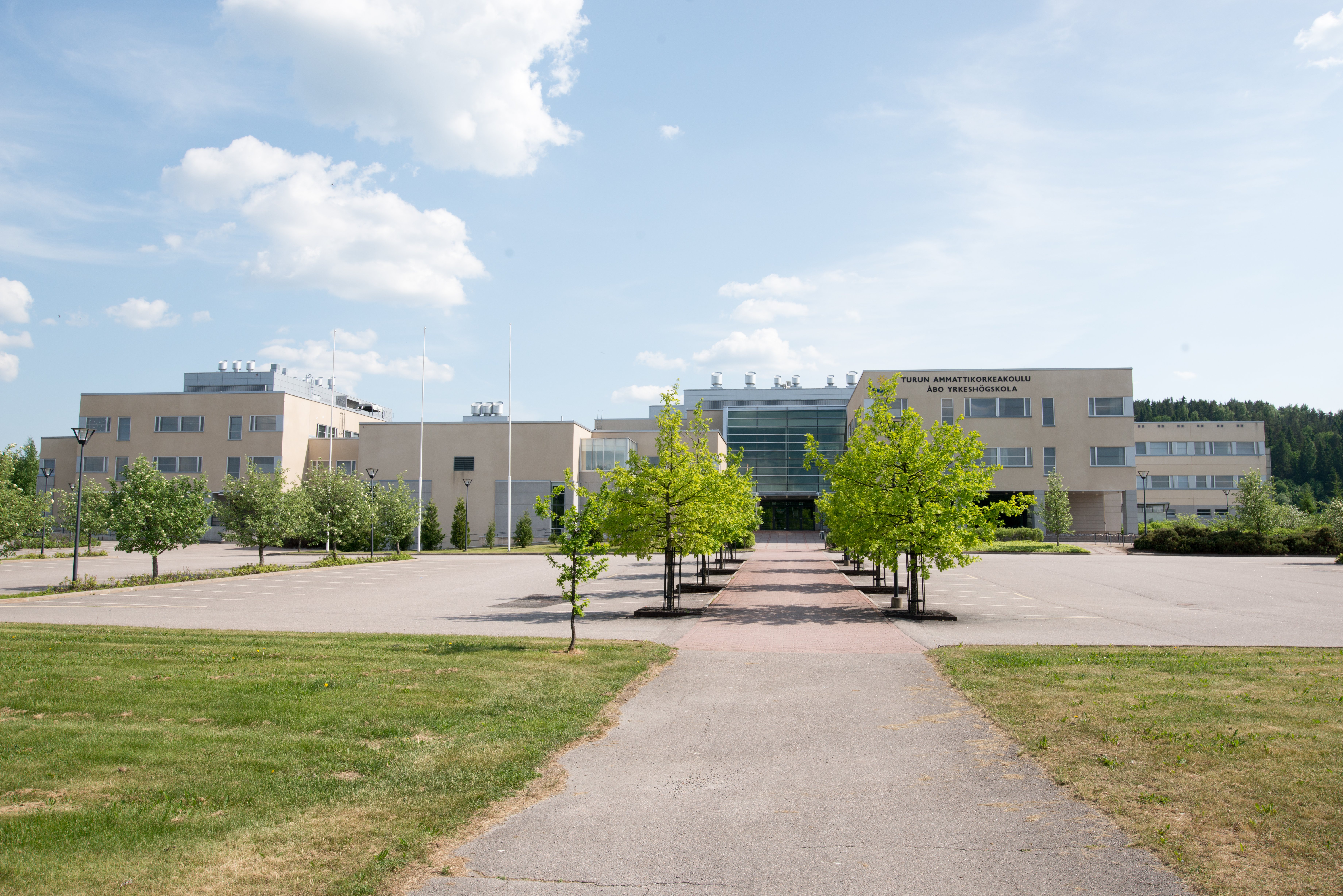 Turun ammattikorkeakoulu, Salon toimipiste